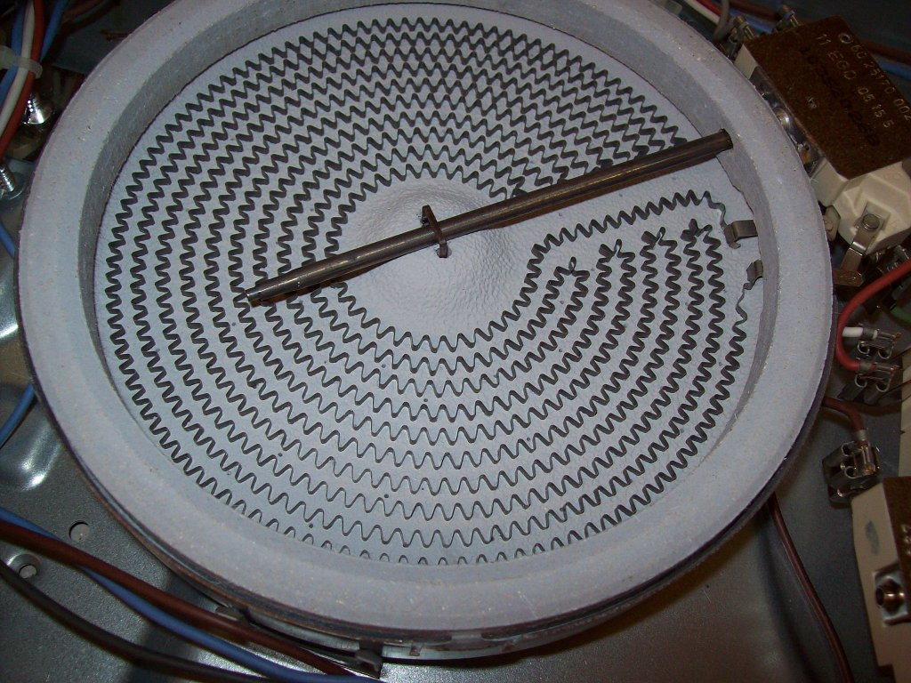 Das Innere eines Cerankochfeldes.